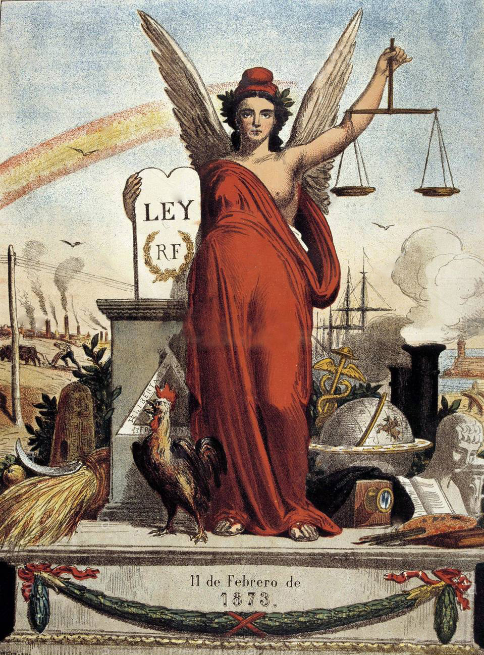 Originally published in "La Flaca" vol. 2, No. 055 (6 March 1873). Alegoría de la proclamación de la Primera República Española. Publicada en "La Flaca" Tomo 2, No. 055 (6 marzo 1873).